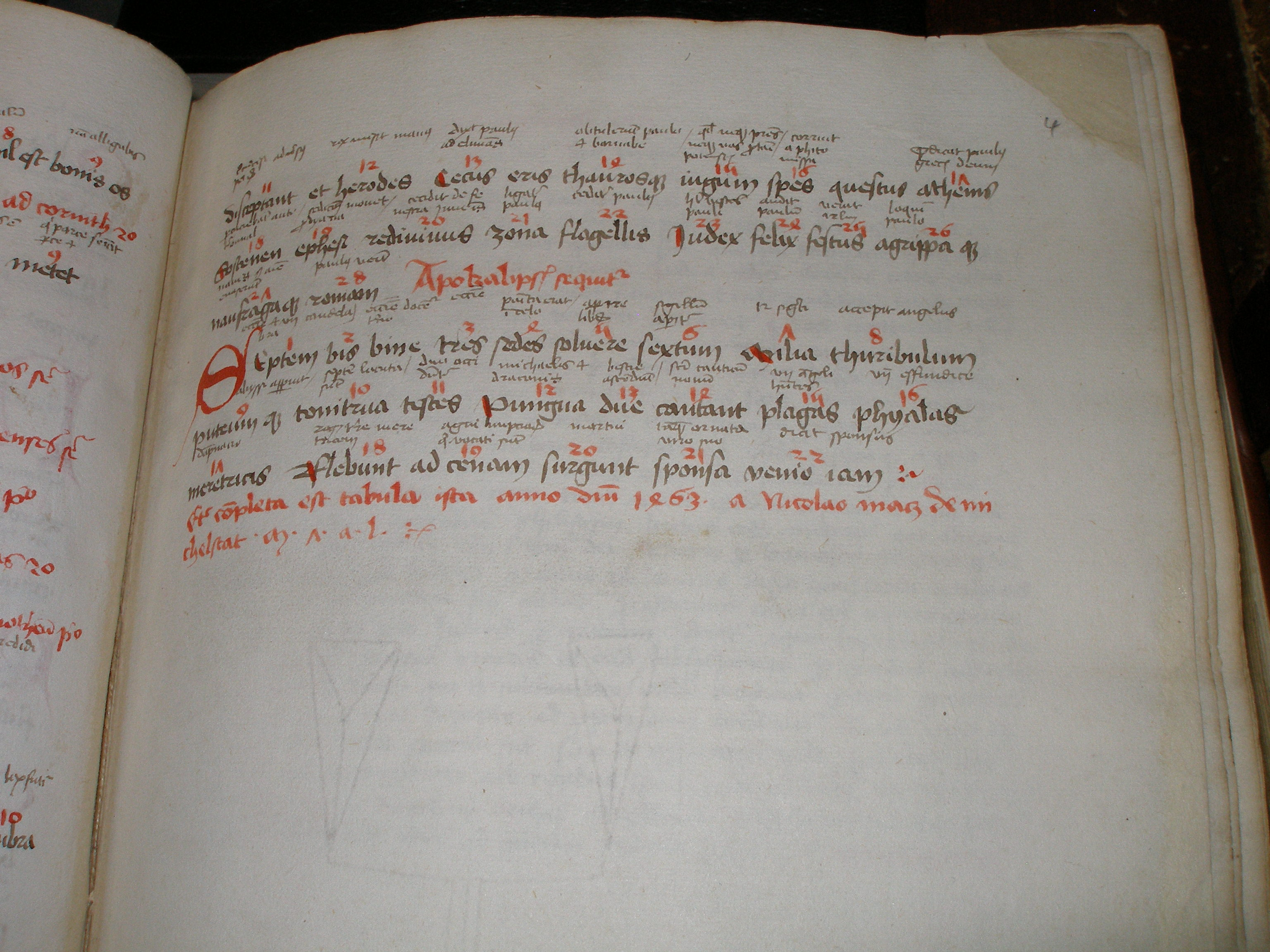 Nikolaus Matz Bibliothek Michelstadt Namenszug von Nikolaus Matz